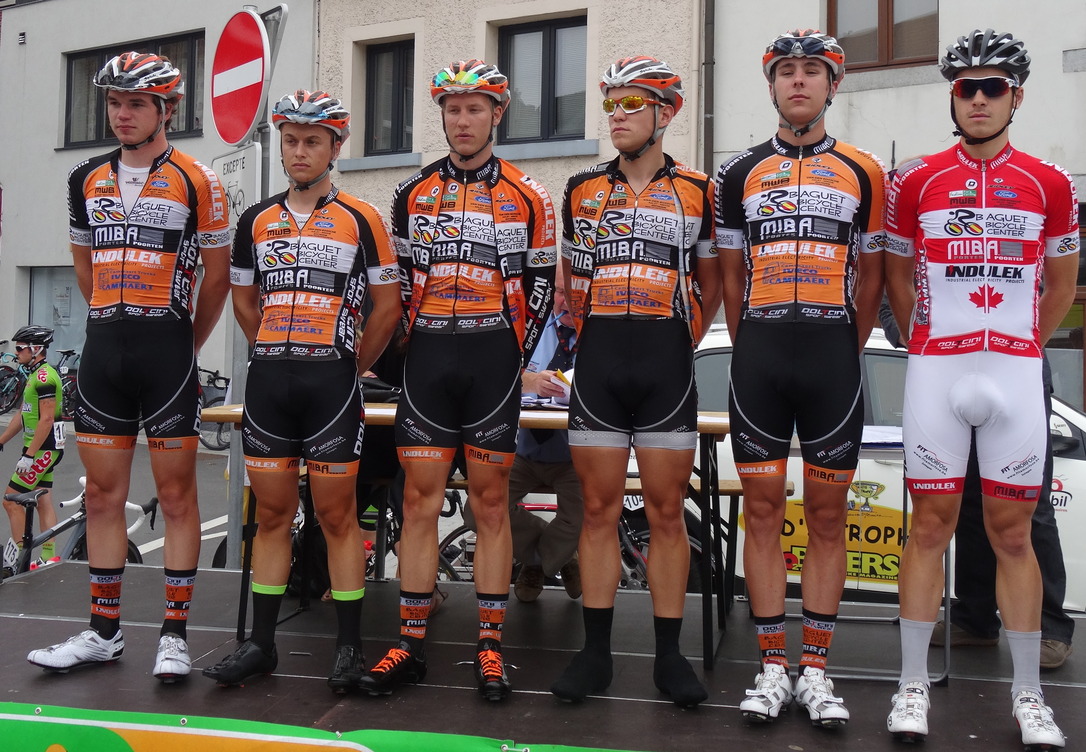 Reportage photographique réalisé le mercredi 6 août à l'occasion du départ de la première étape du Tour de la province de Namur 2014 à Jambes (Namur), Belgique.